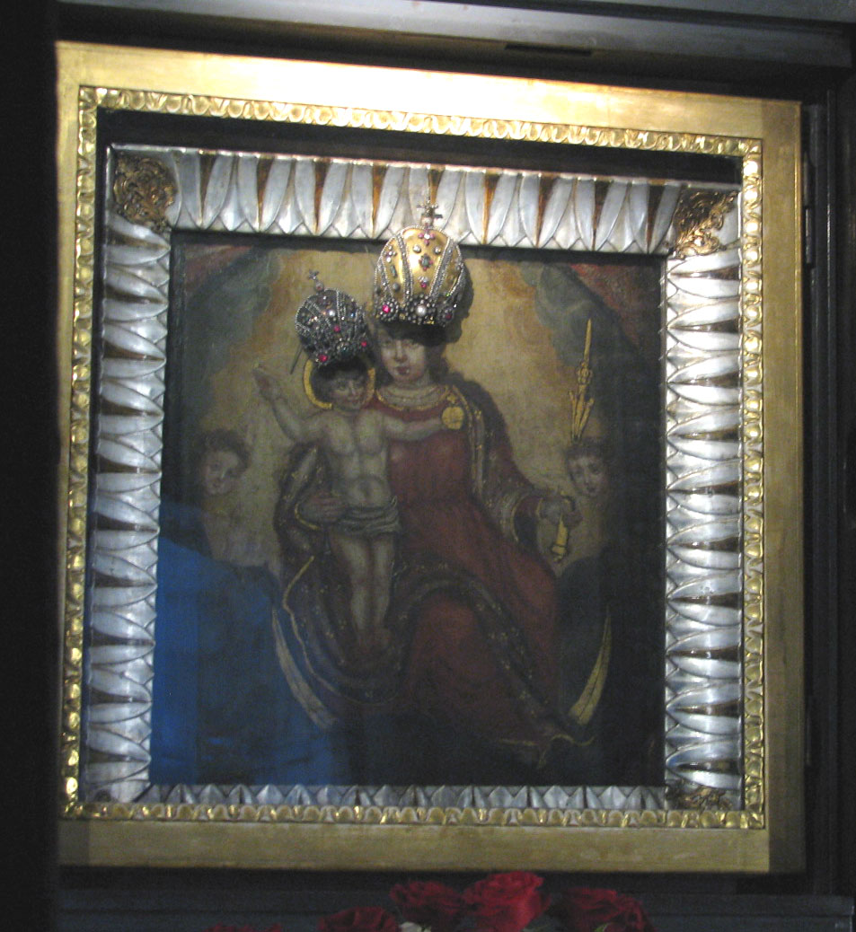 Slika Majke Božje od Kamenitih vrata